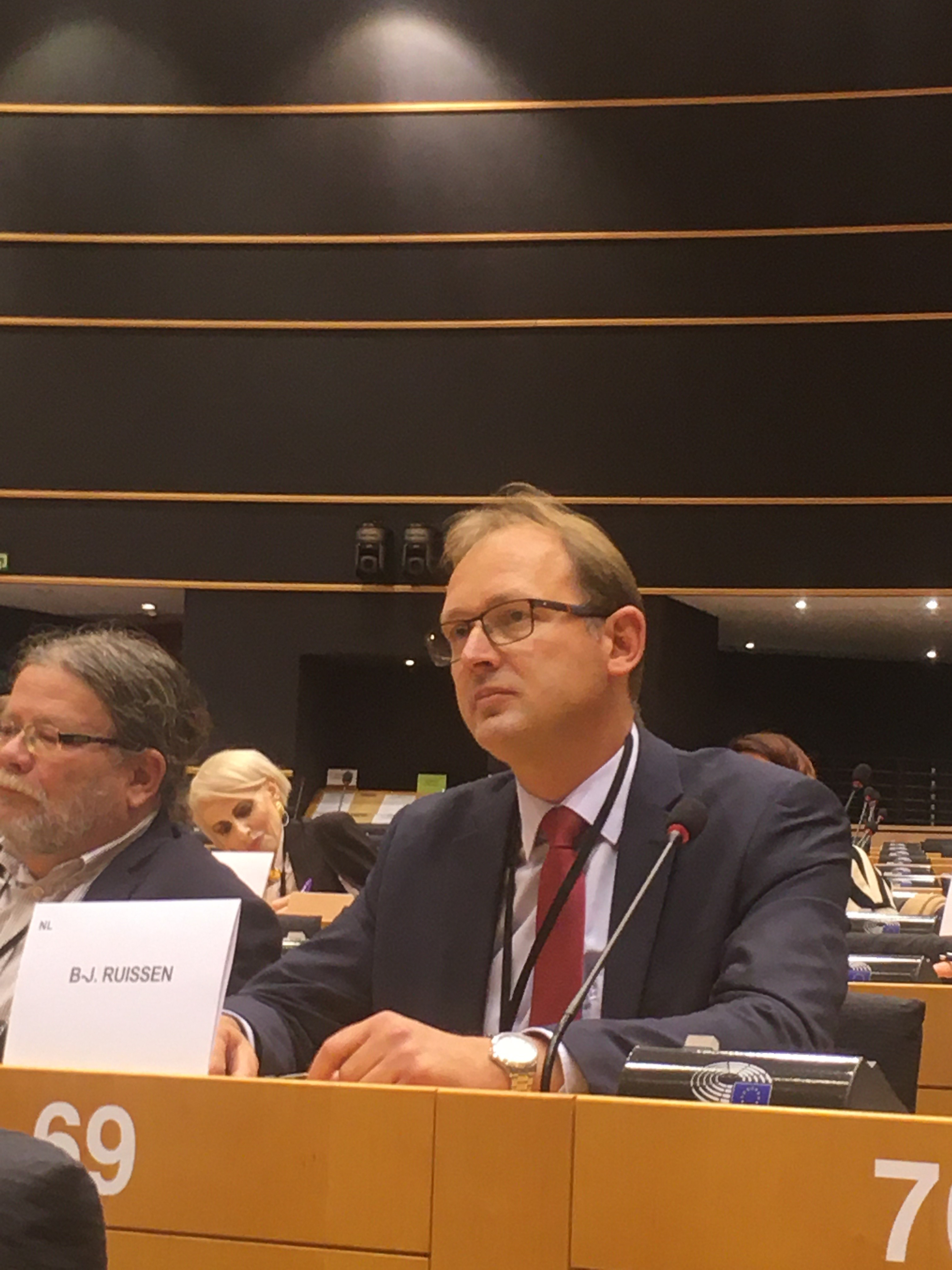 Bert-Jan Ruissen (SGP) in een vergaderzaal in het Europarlement Brussel